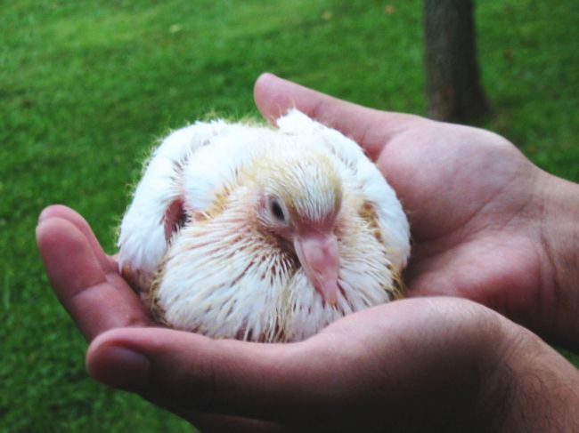 Baby pigeon